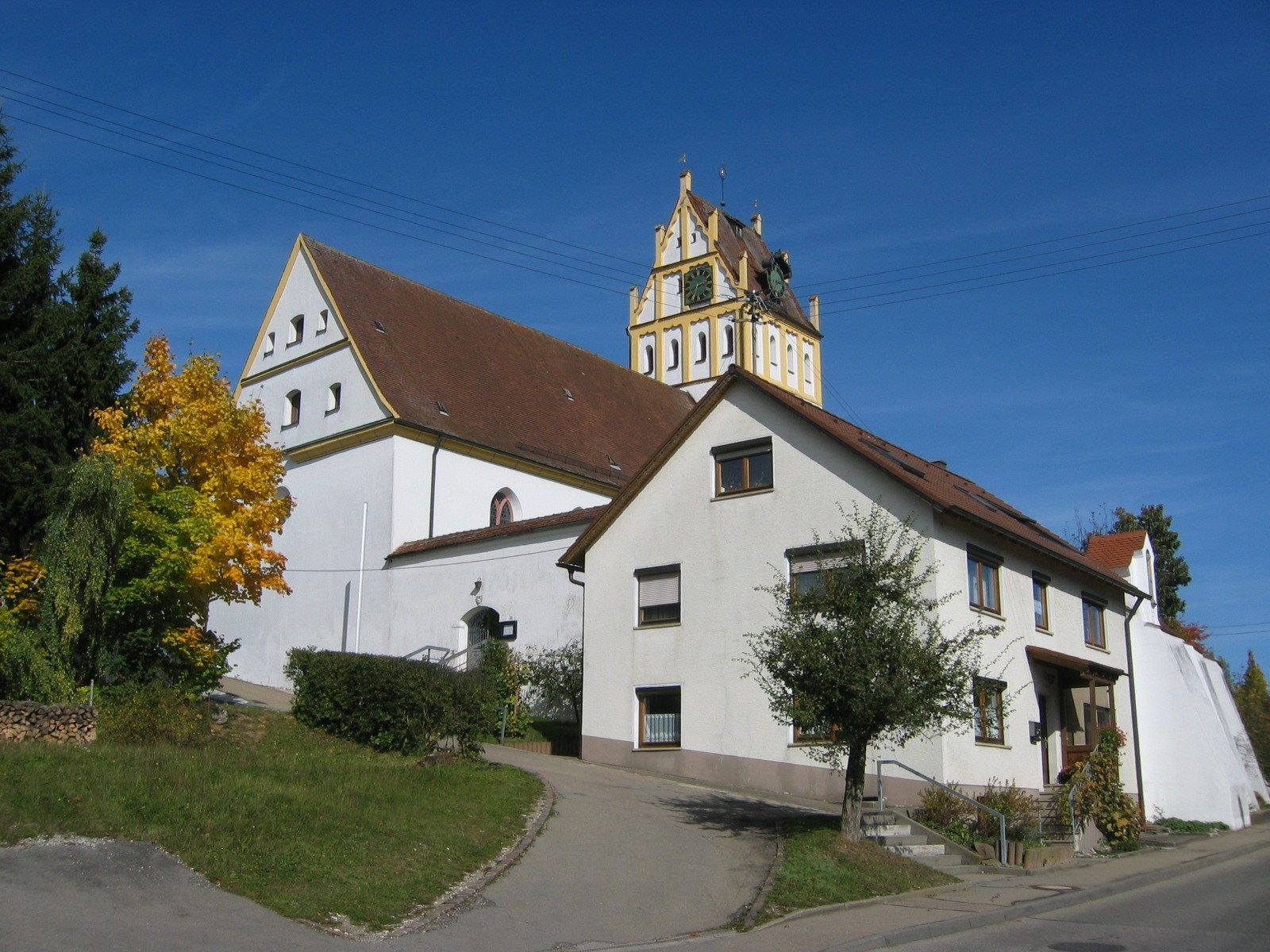 Altheim (Alb), Alb-Donau-Kreis: Evangelische Pfarrkirche